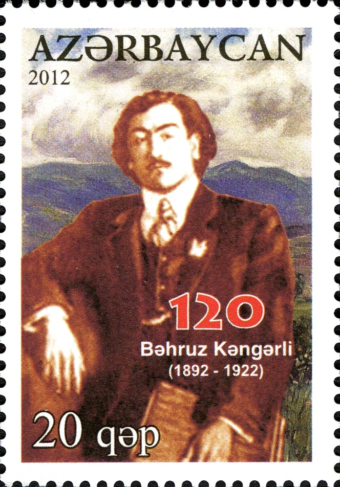 Bəhruz Kəngərlinin 120 illiyinə həsr olunmuş marka.